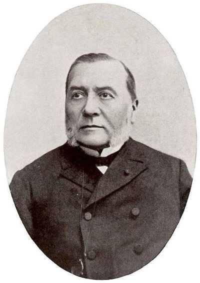 "Charles-Nicolas Welche, maire de Nancy, 1869-1872".